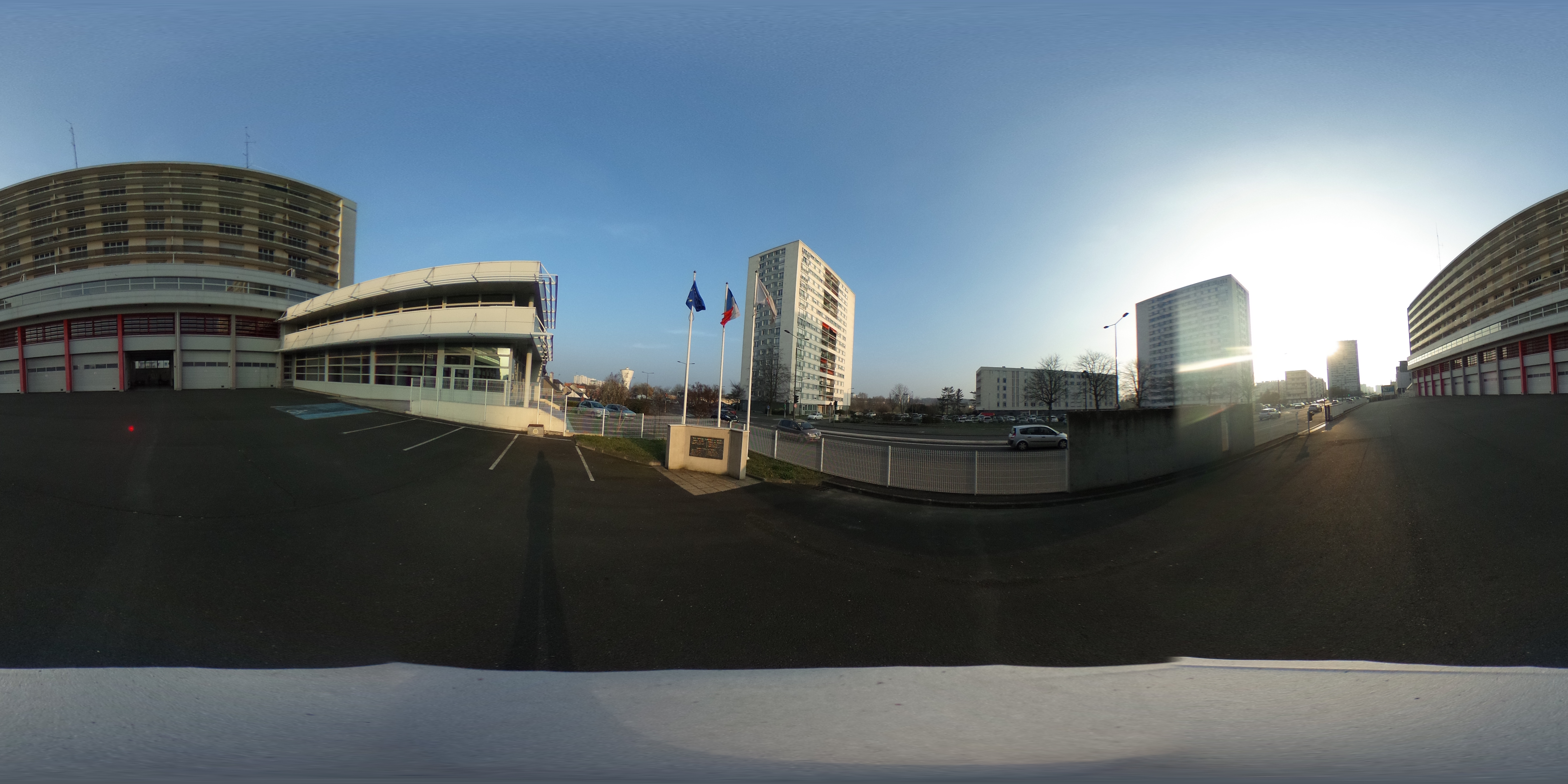 Parvis opérationnel du Centre de Secours Principale de Tours Centre (Pompier)